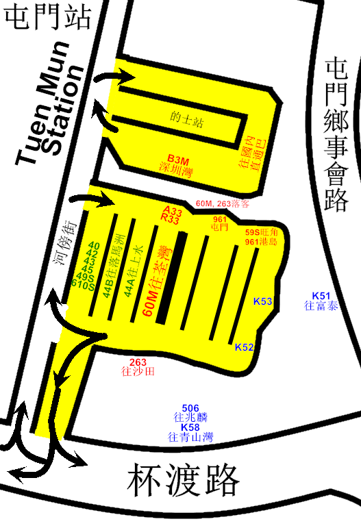 中文（香港）: 屯門西鐵站巴士總站的平面圖